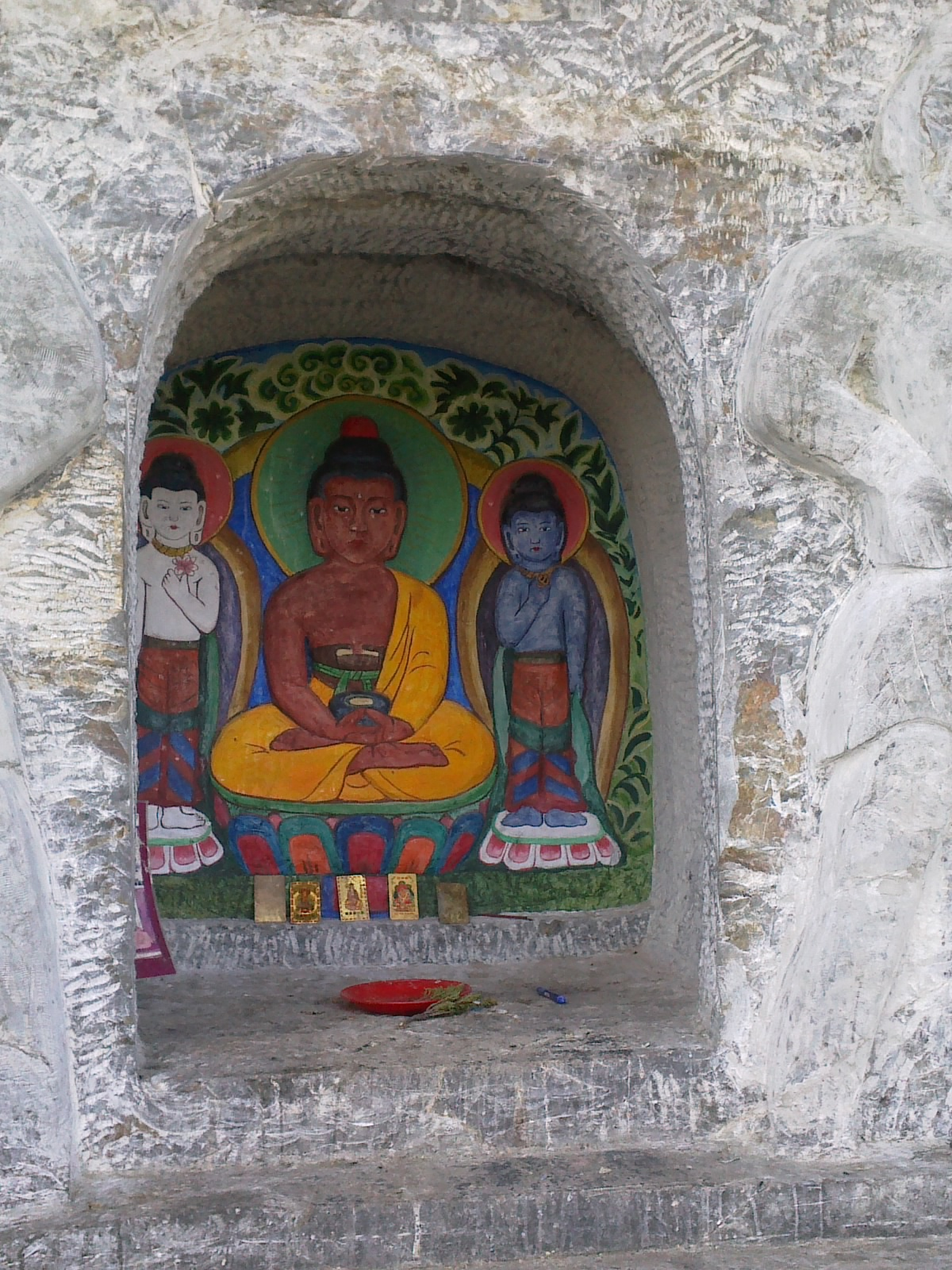 Скальное буддийское святилище - гора Будды. Чаа-Хольский кожуун